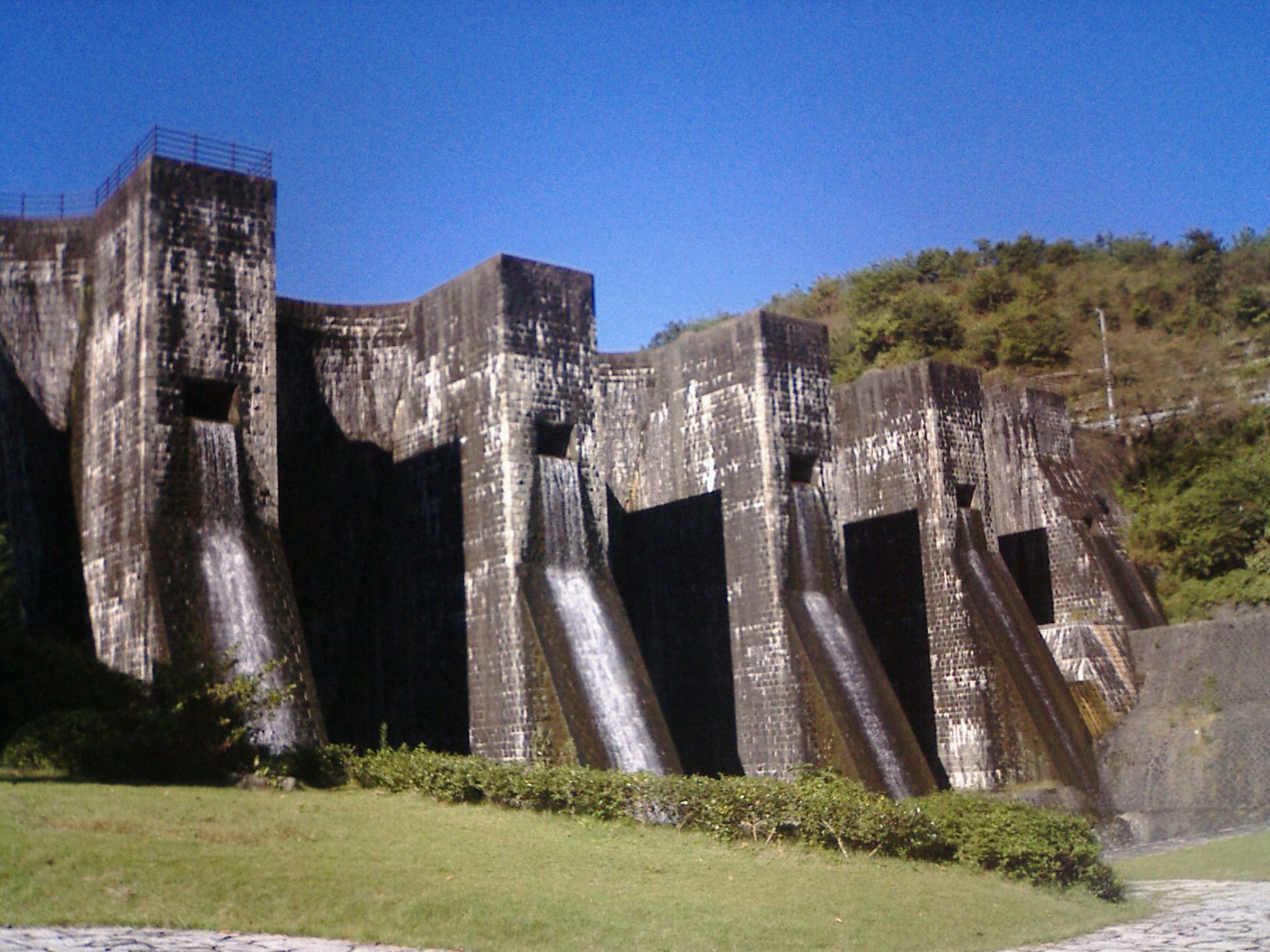 豊稔池ダム - 日本国香川県観音寺市